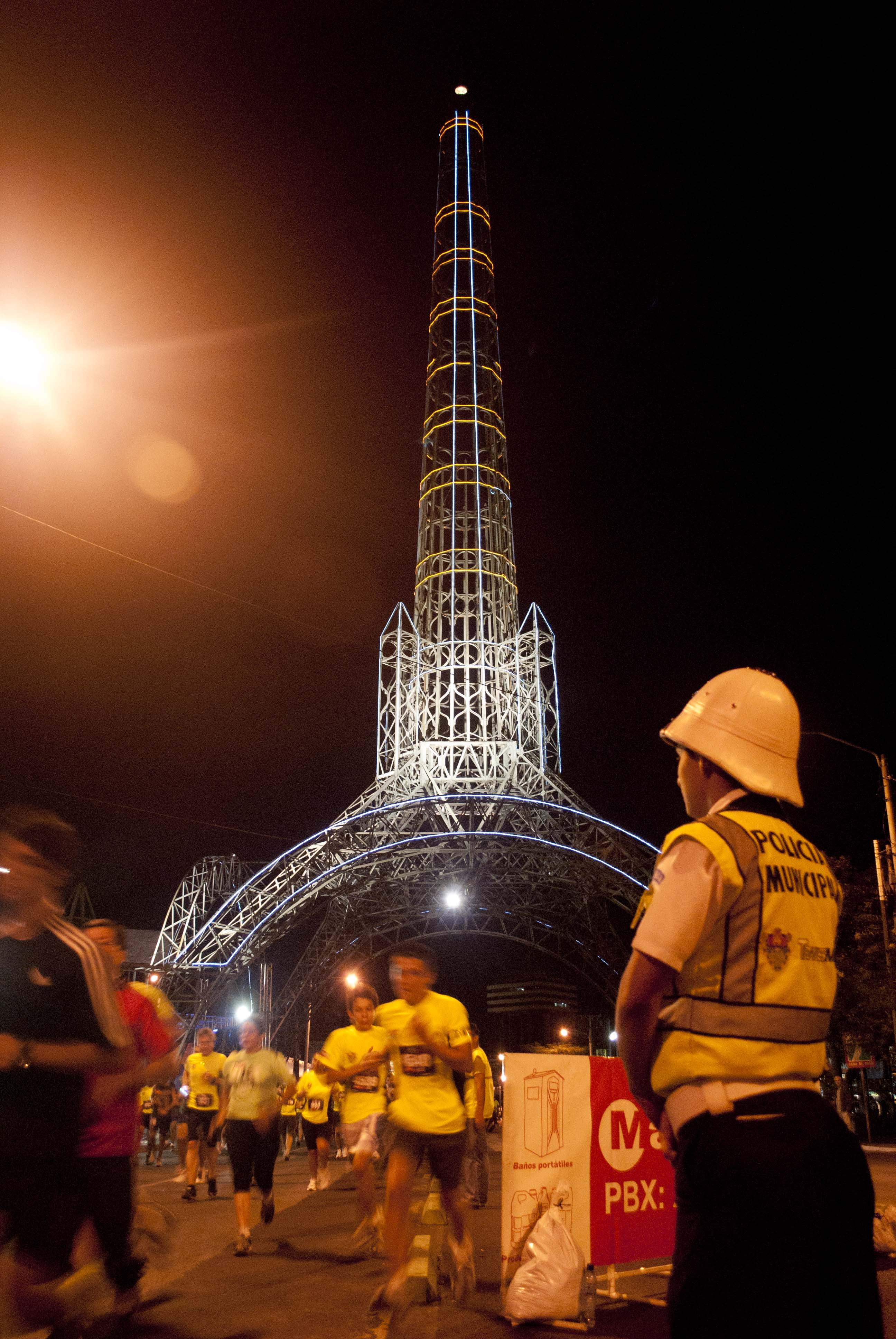 Carrera nocturna ciudad de Guatemala